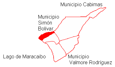 Ubicación de la Parroquia Libertad Municipio Lagunillas, Zulia, Venezuela